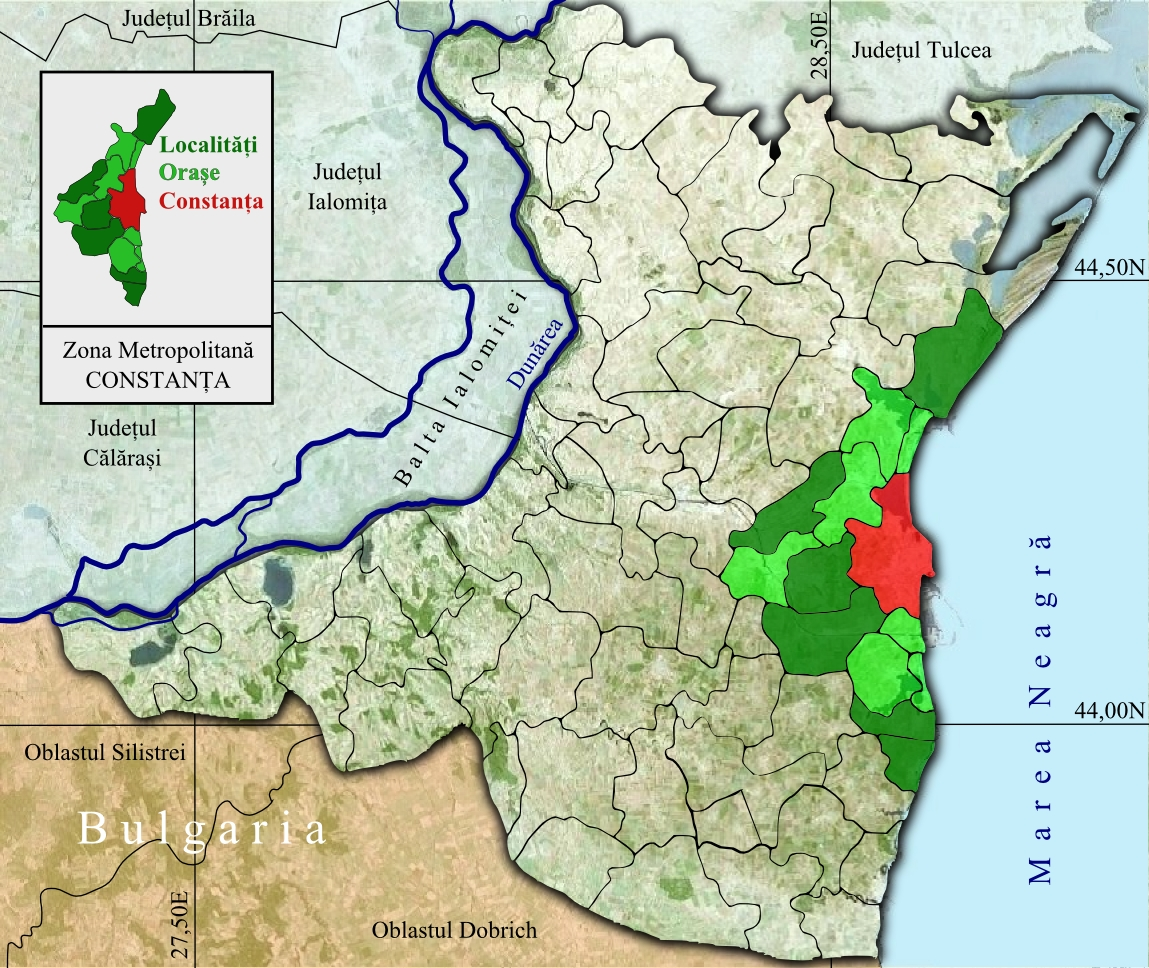 Constanta Metropolitan Area jud Constanta.jpg